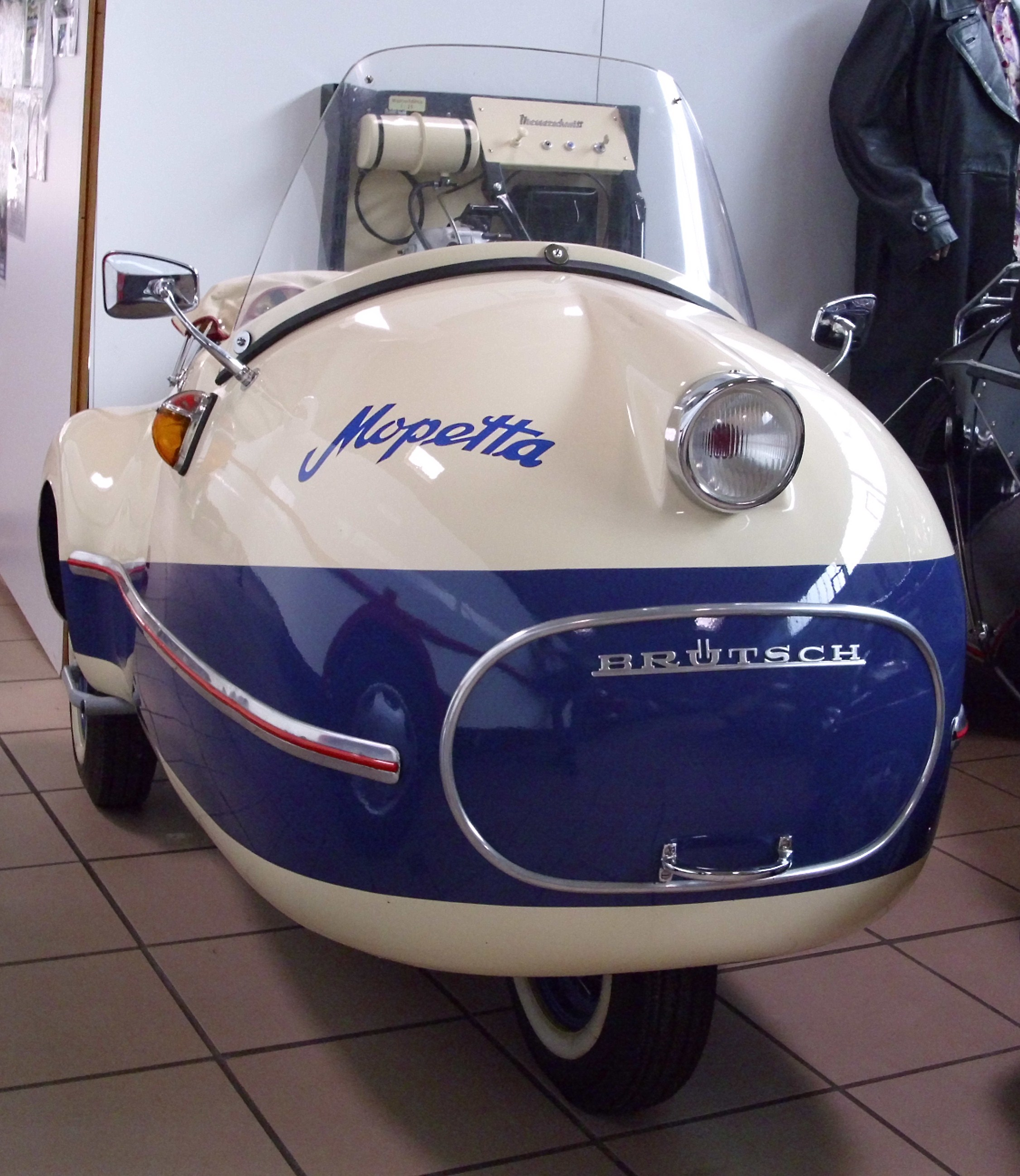 Brütsch Mopetta 1958